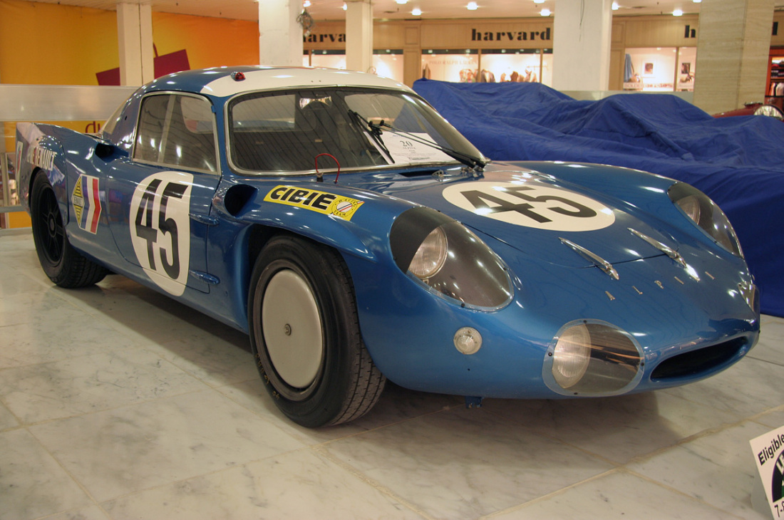 Alpine